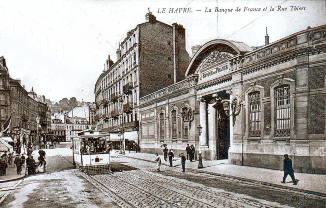 Tramway du Havre, la Banque de France et la rue Thiers